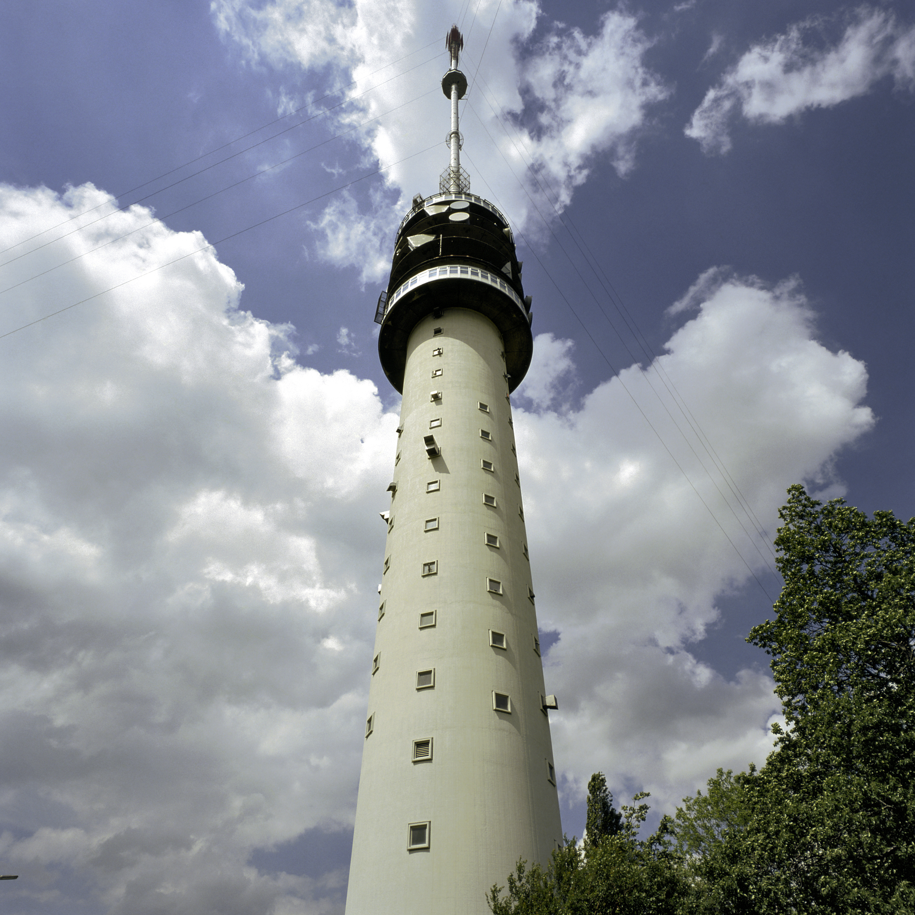 Gerbrandytoren: Aanzicht van de toren, omhoog gezien (opmerking: Gefotografeerd voor Toonbeelden van de Wederopbouw)